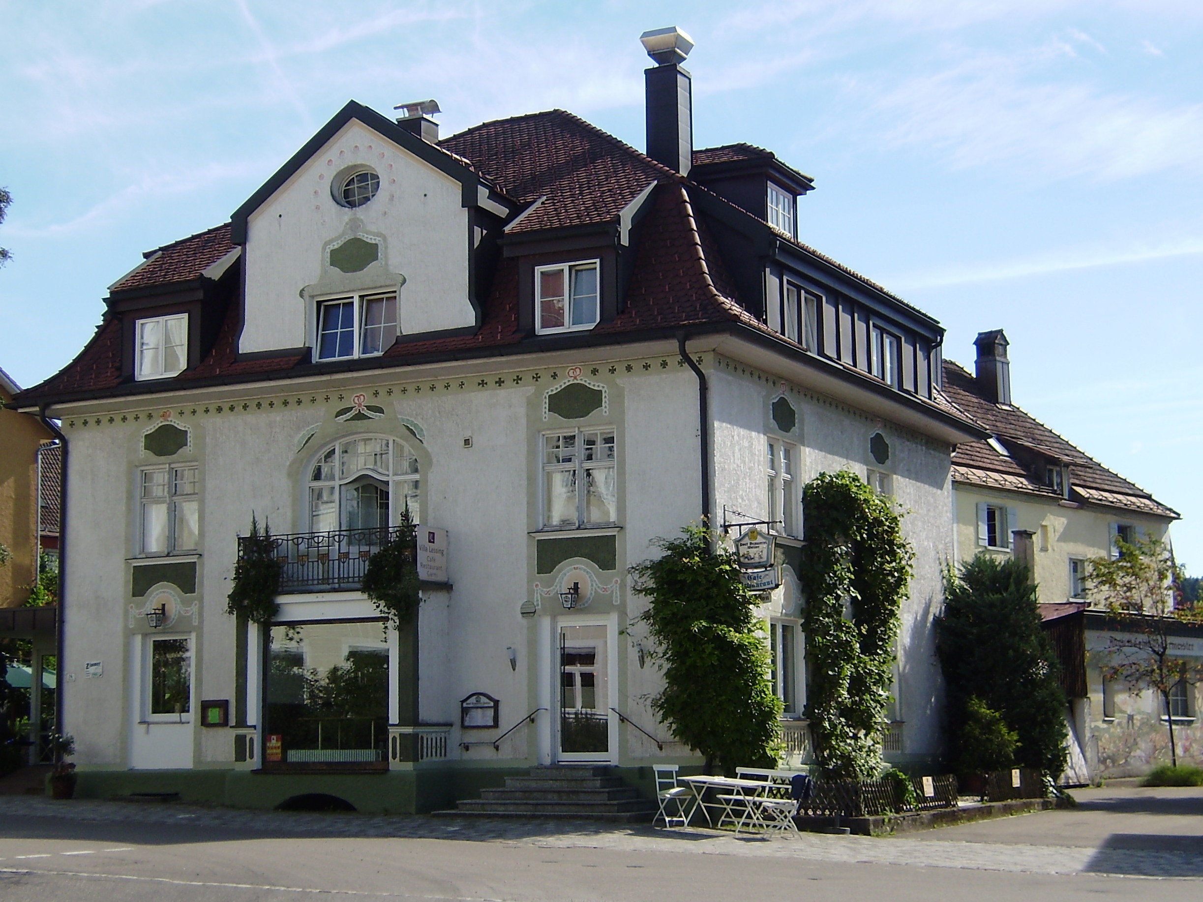 Villa Inama, Bahnhofstr 14, WeileriA. 1903/1904 errichtet vom Architekten und Baumeister Georg Bufler für den Peitschenfabrikanten Nicolò Inama aus dem Trentino. Später richteten sich in dem schmucken Gebäude nacheinander mehrere Café-Restaurants mit Pensionsbetrieb ein: Café Bader, Café Weichselbaumer, Café Weiler, Villa Galen, Villa Lessing.